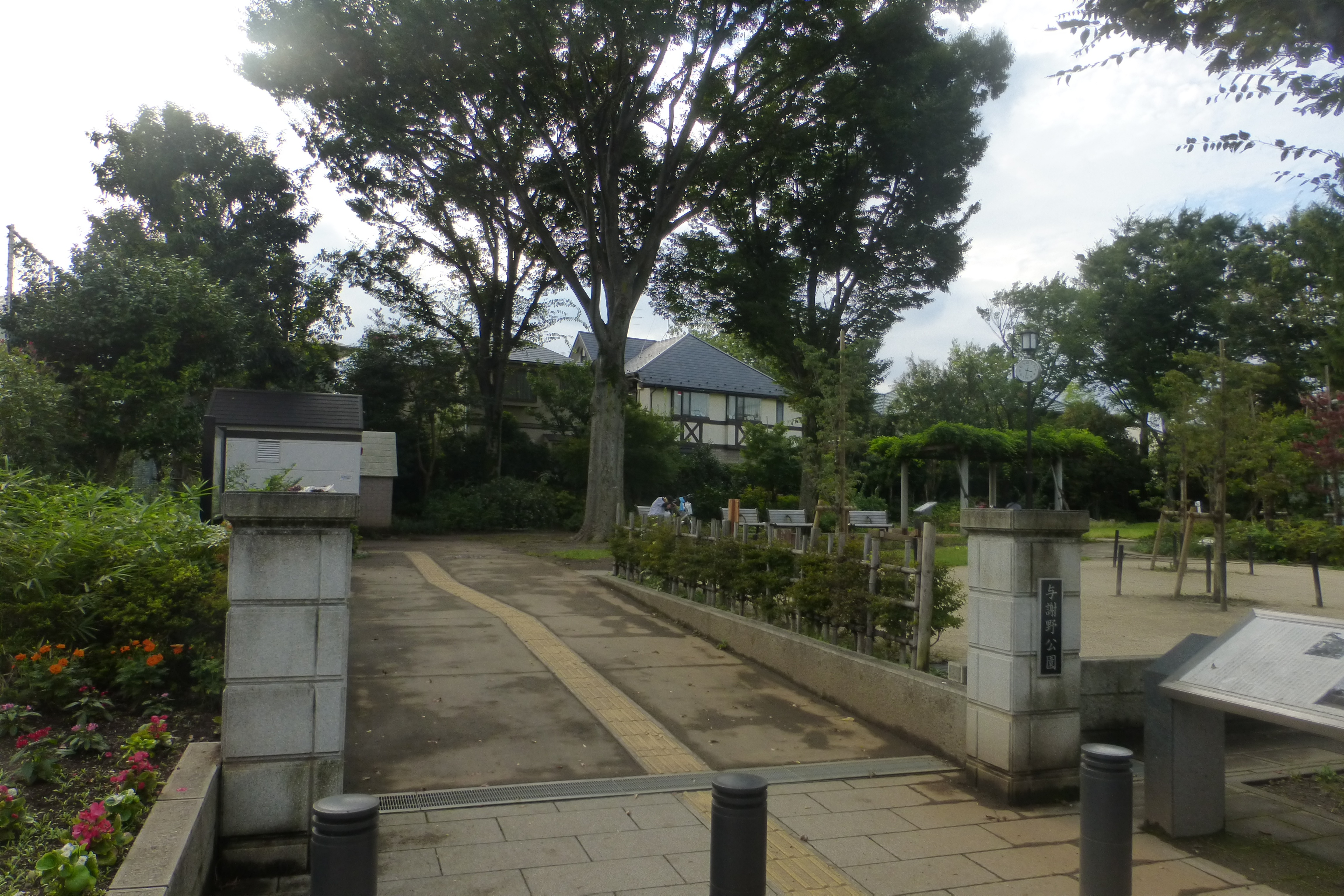 与謝野公園（よさのこうえん、Yosano Park）は、東京都杉並区南荻窪にある杉並区立の公園である。